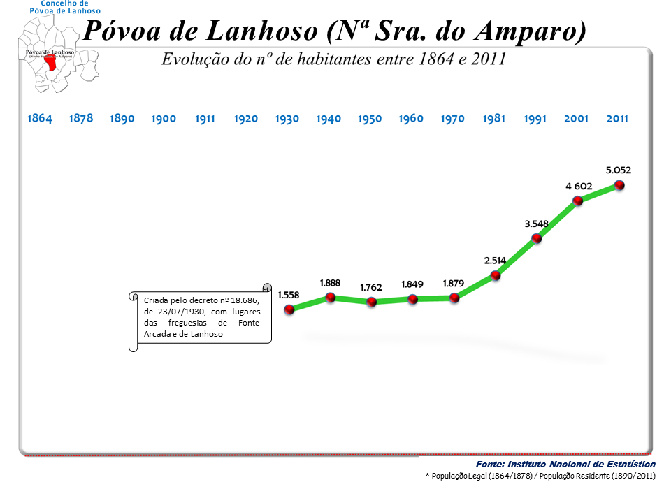 Censos 1864/2011